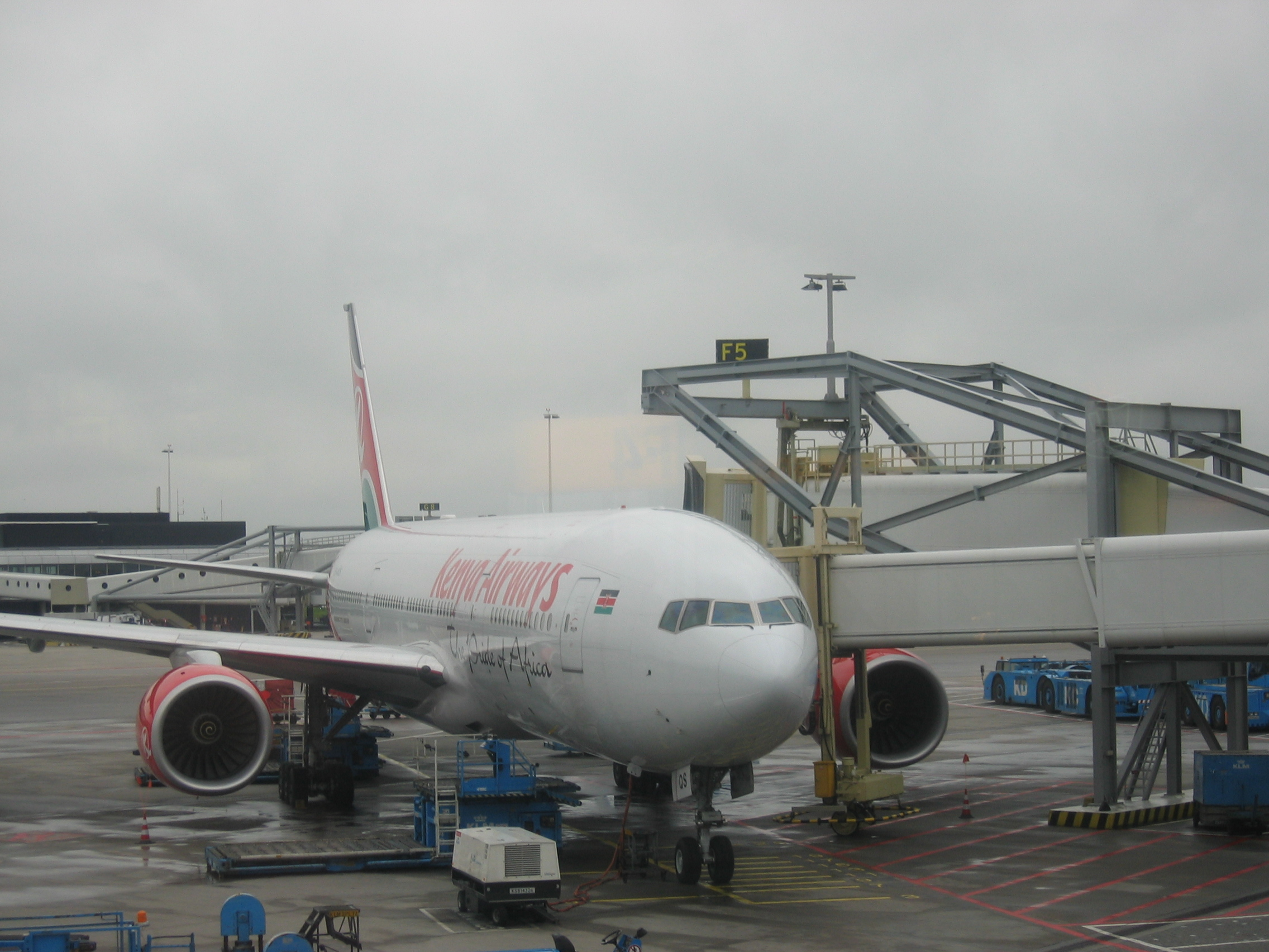 Die Maschine (Boeing 777) von Kenya Airways, mit der wir von Amsterdam Schiphol nach Nairobi (Kenya) geflogen sind.